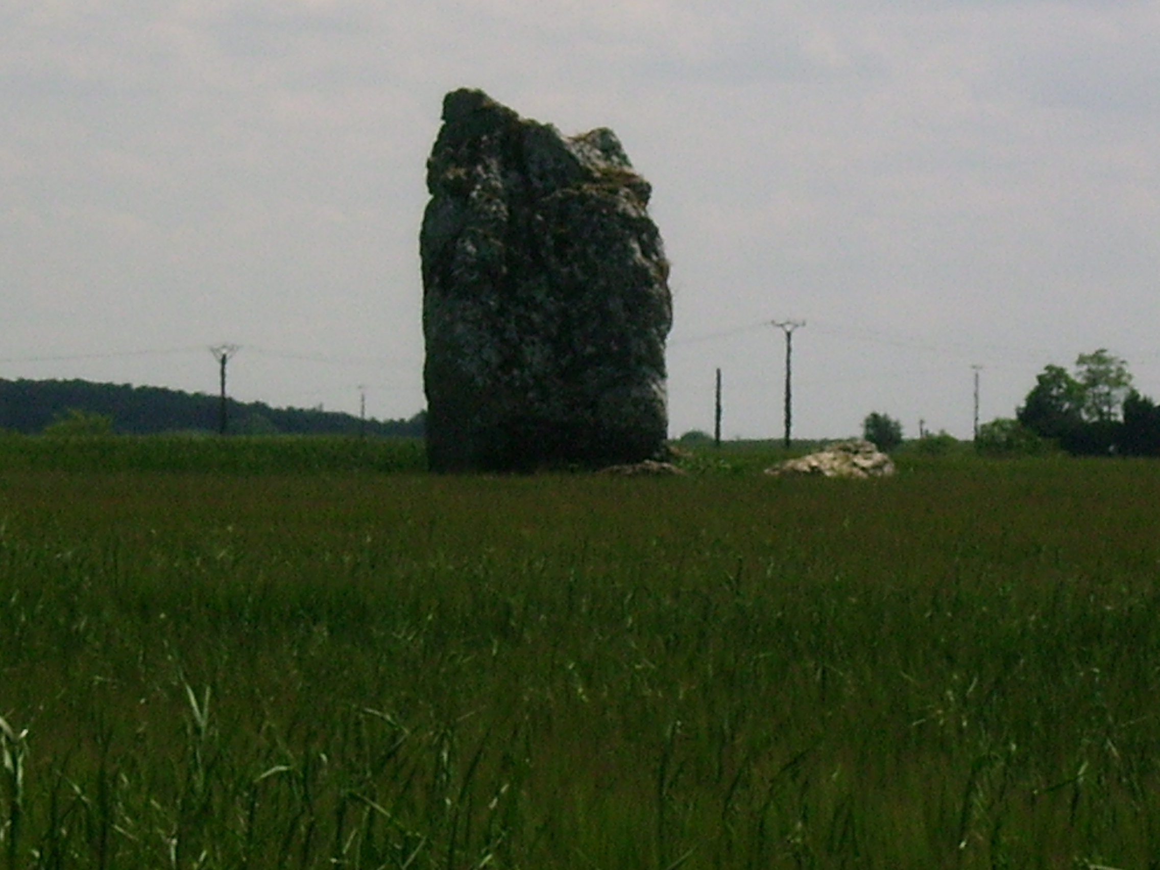 Menhir de la Drue, à Tripleville (Loir-et-Cher, France) .